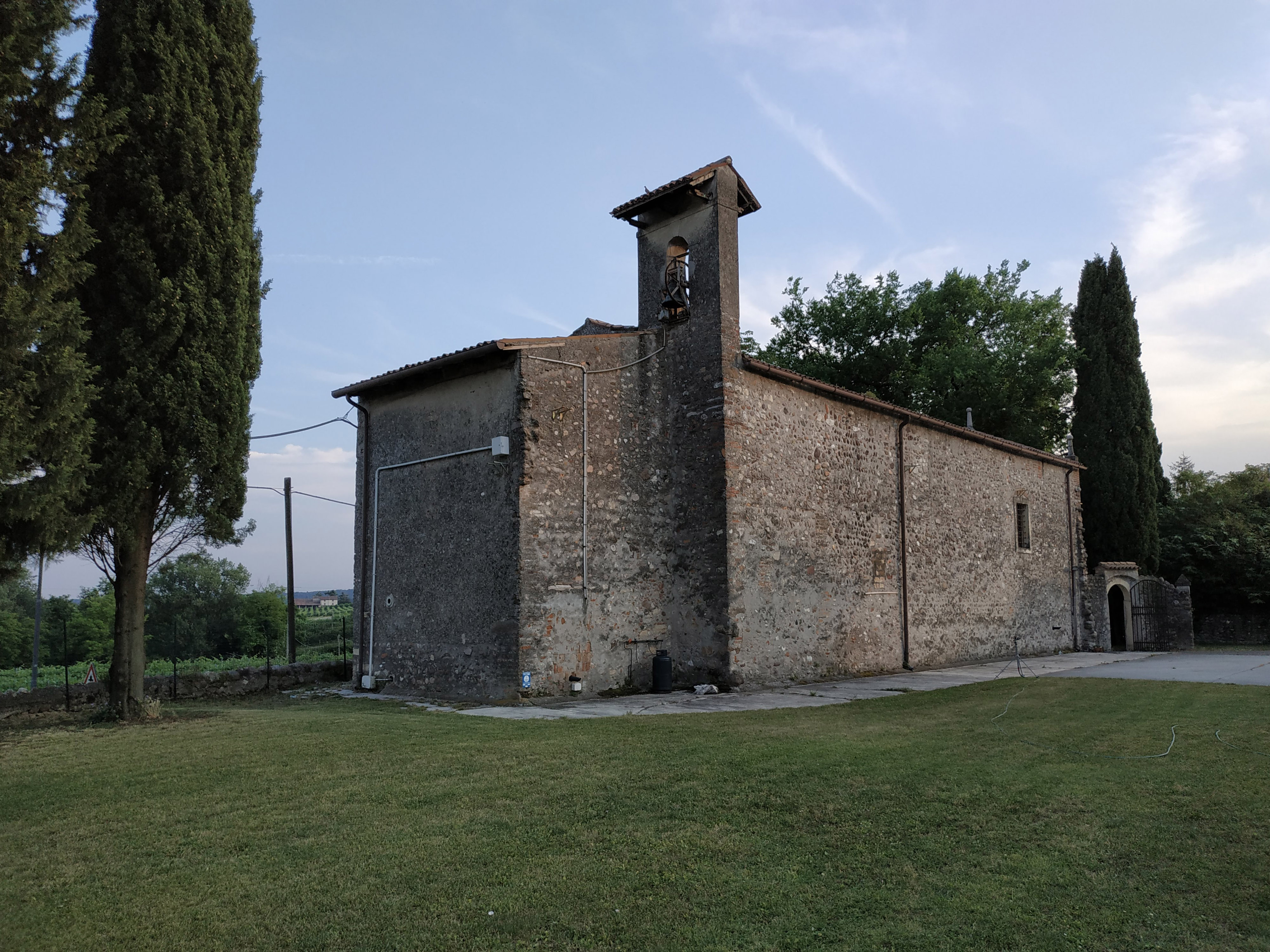 Vista dell'abside e della parte sinistra della chiesa di San Rocco (Sona Vr) vista dal cortile posteriore della chiesa stessa